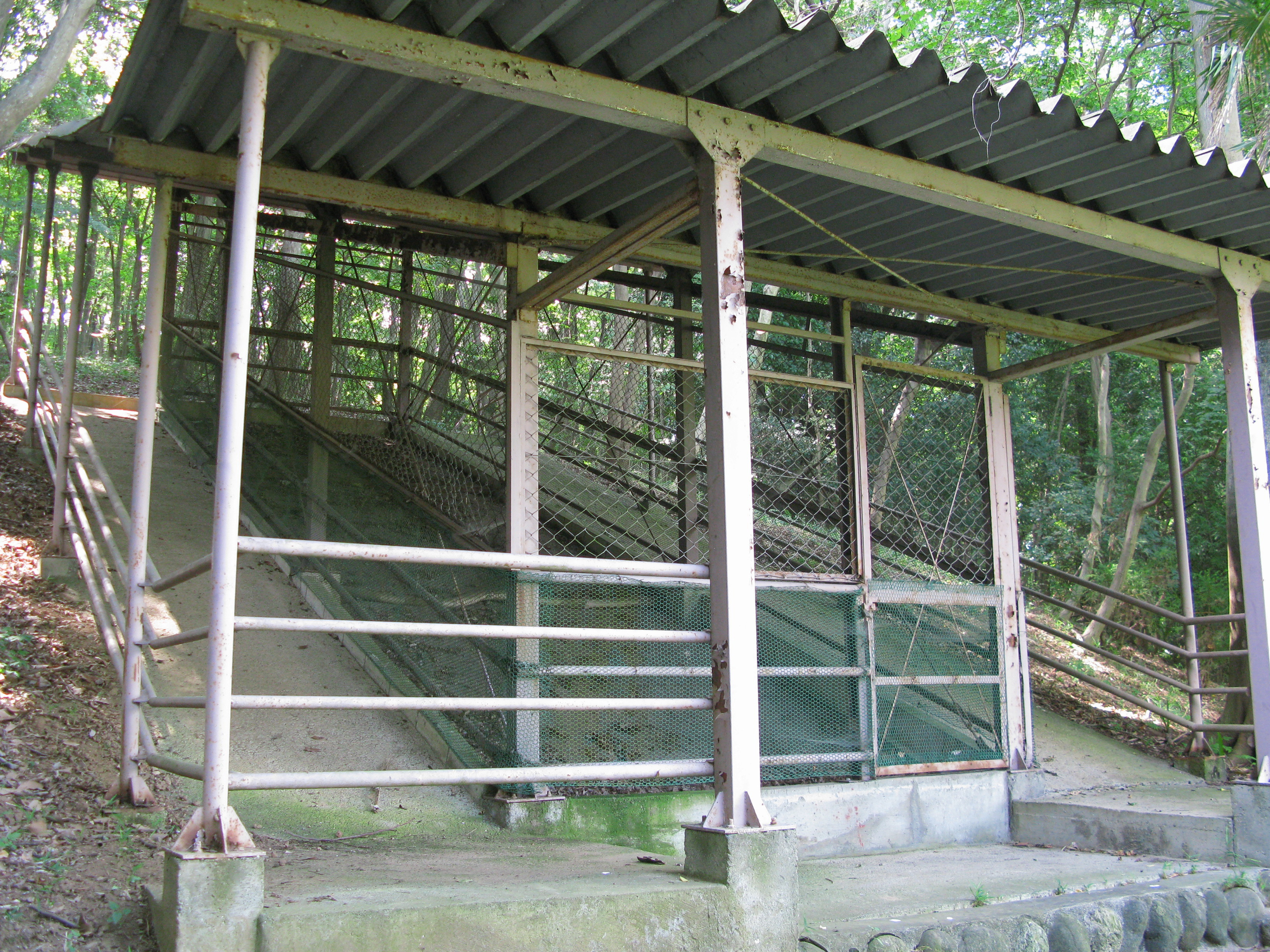 Oya Tile Kiln Site, Higashimatsuyama, Saitama, Japan